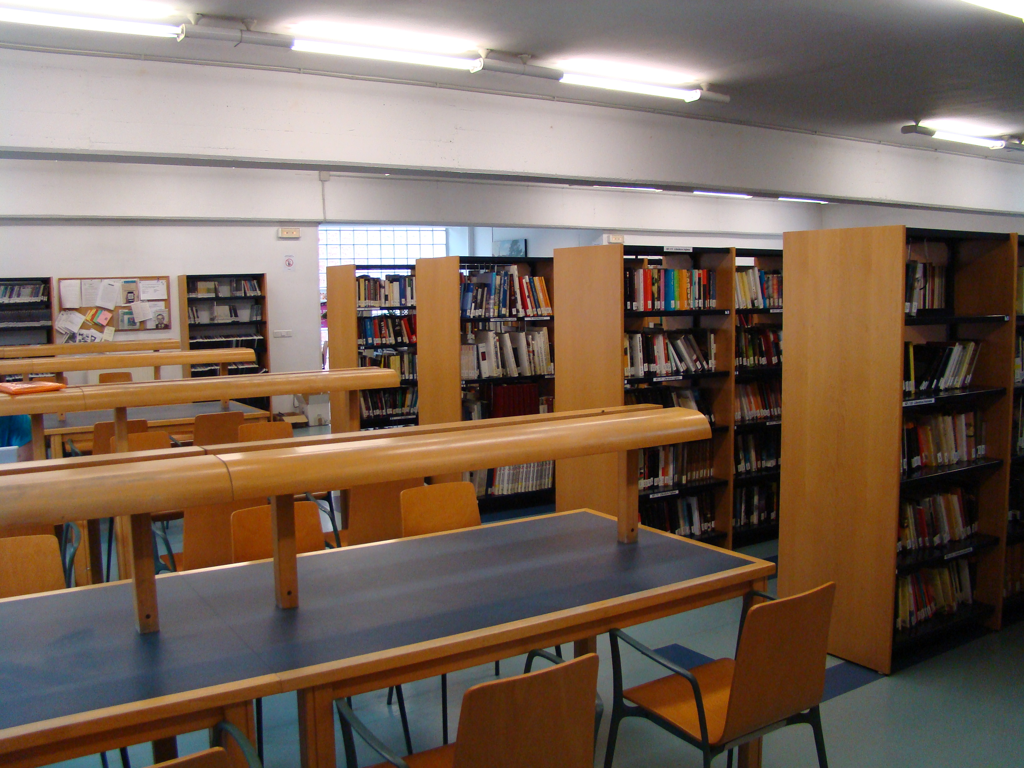 detalle de la colección de la biblioteca de lugones